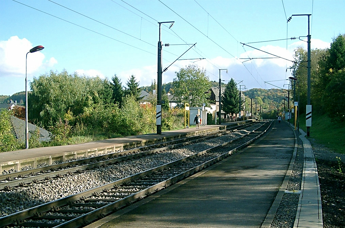 Gare Uewerkuer